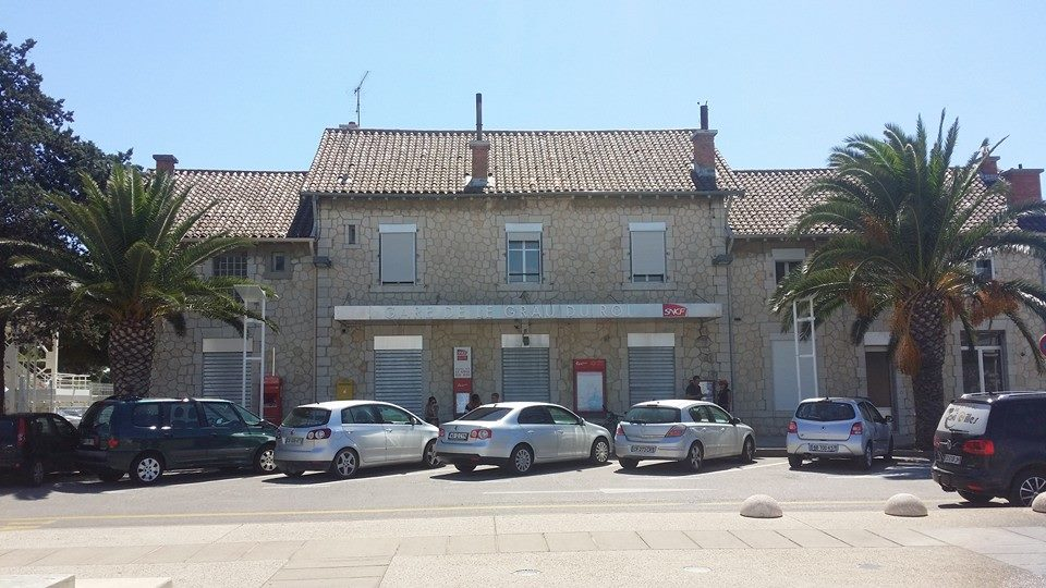 Gare du Grau Du Roi